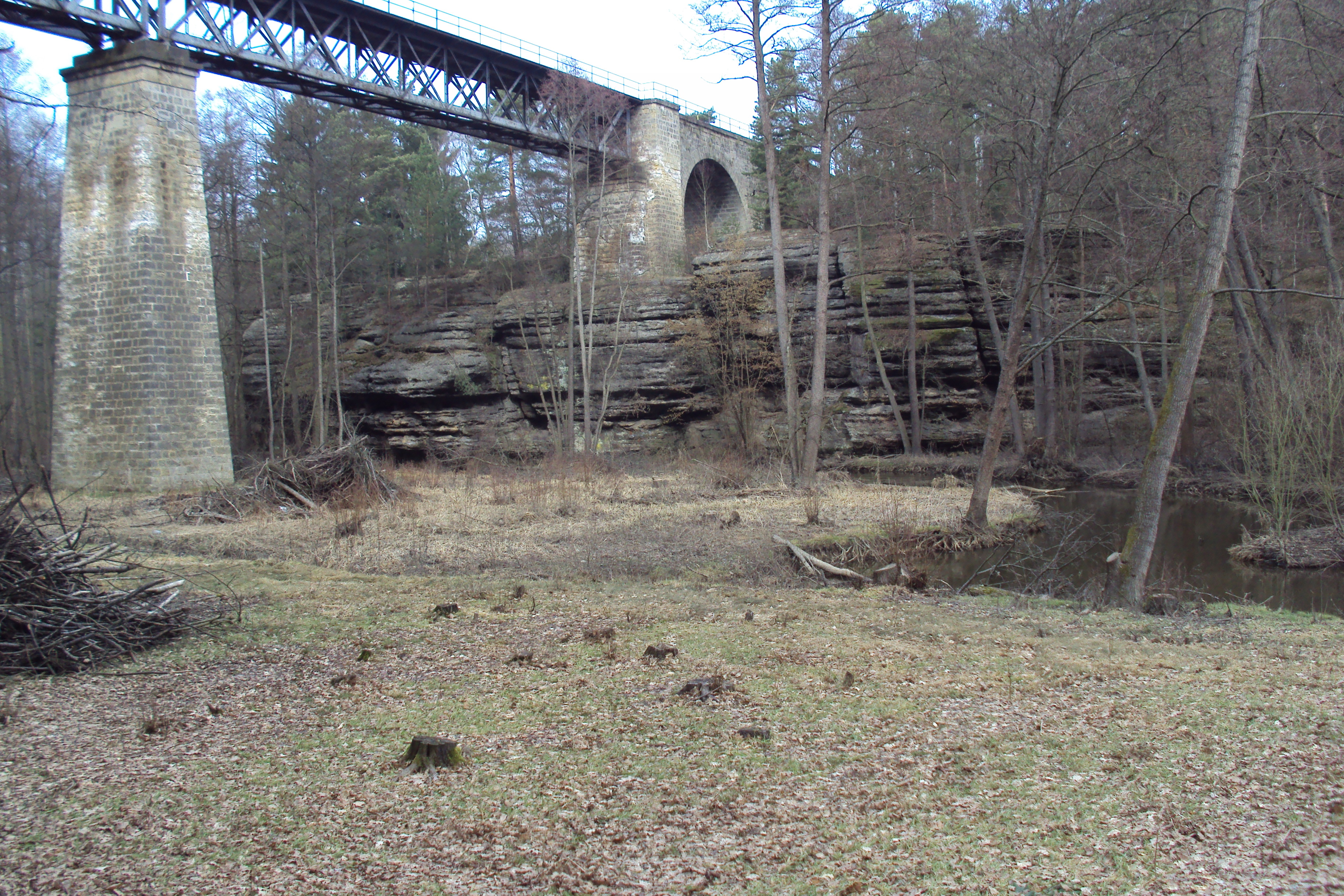 Funkční železniční most je technickou památkou, vede nad Robečským potokem u osady Karba u Zahrádek